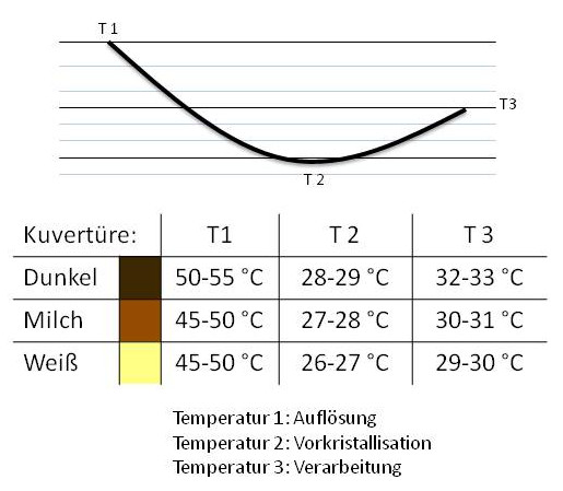 Termperierschritte bei der Schokoladeverarbeitung